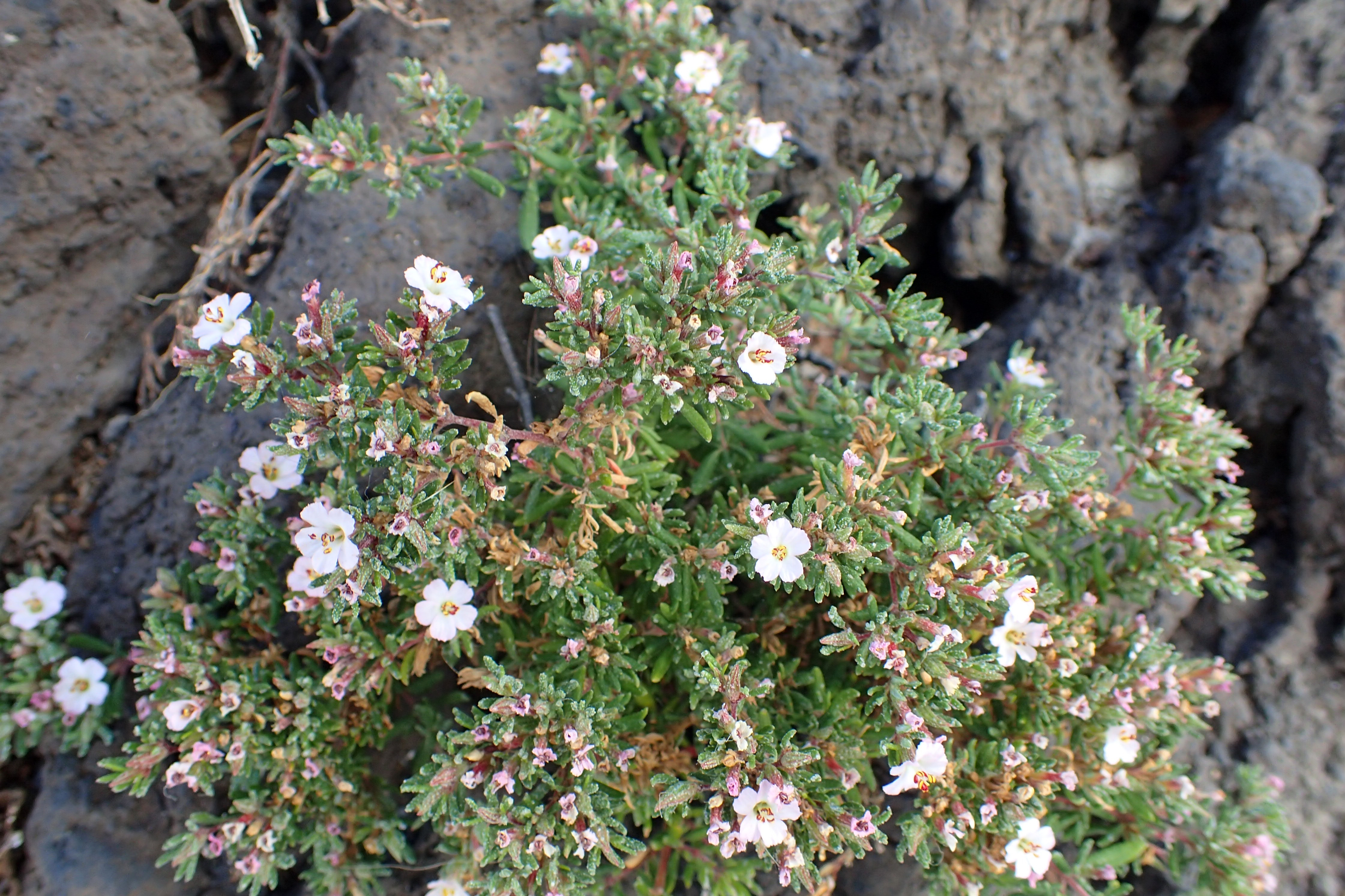 Frankenia ericifolia in Garachico, Tenerife, Canary Islands, Spain